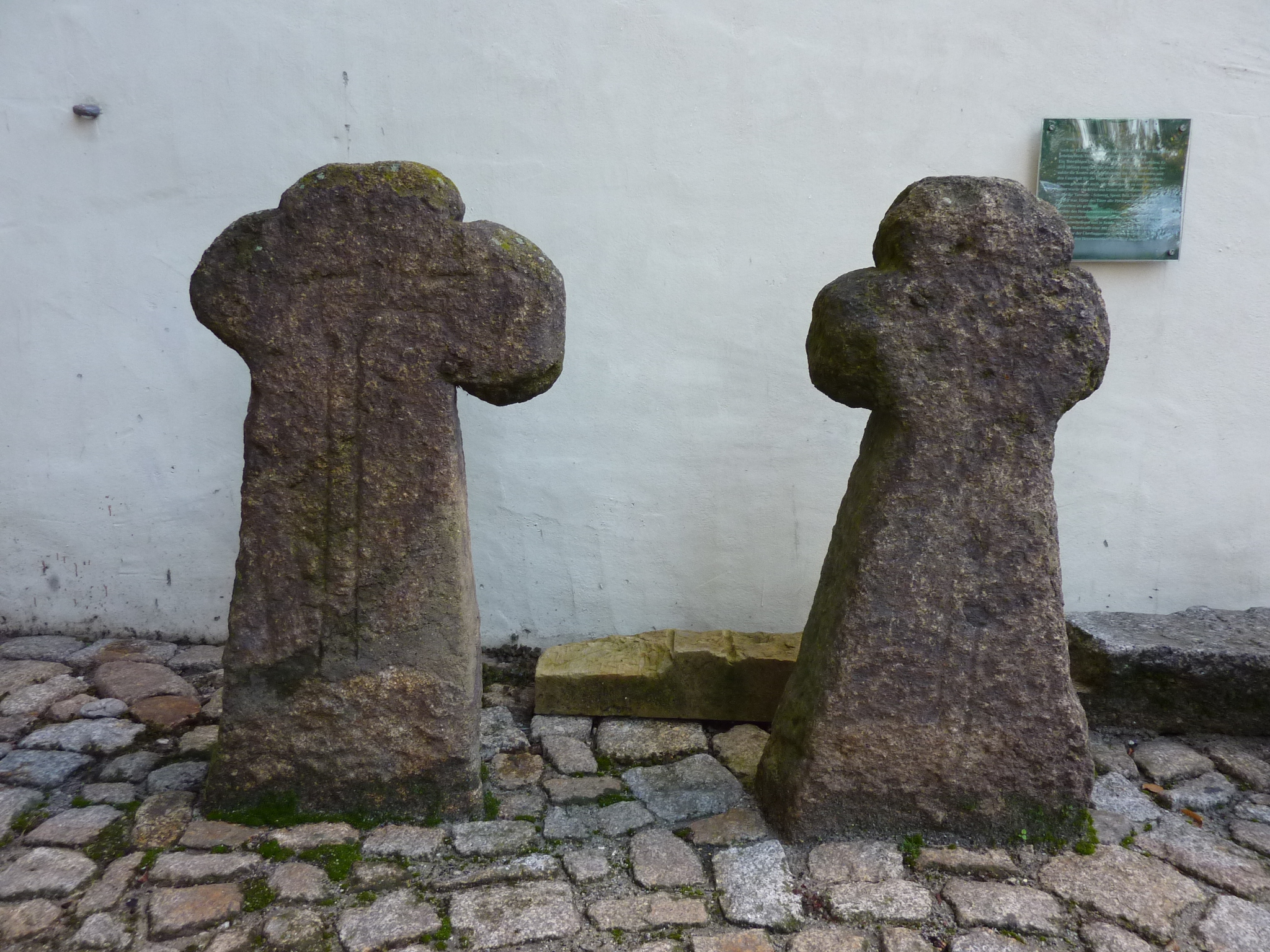 Sühnekreuze der devastierten Orte Lippen und Scado, sie stehen heute im Schloss Hoyerswerda Hornjoserbsce: Pokutnej křižej z wotbagrowaneju wsow Lipin a Škódowa, dźensa na Wojerowskim hrodźe